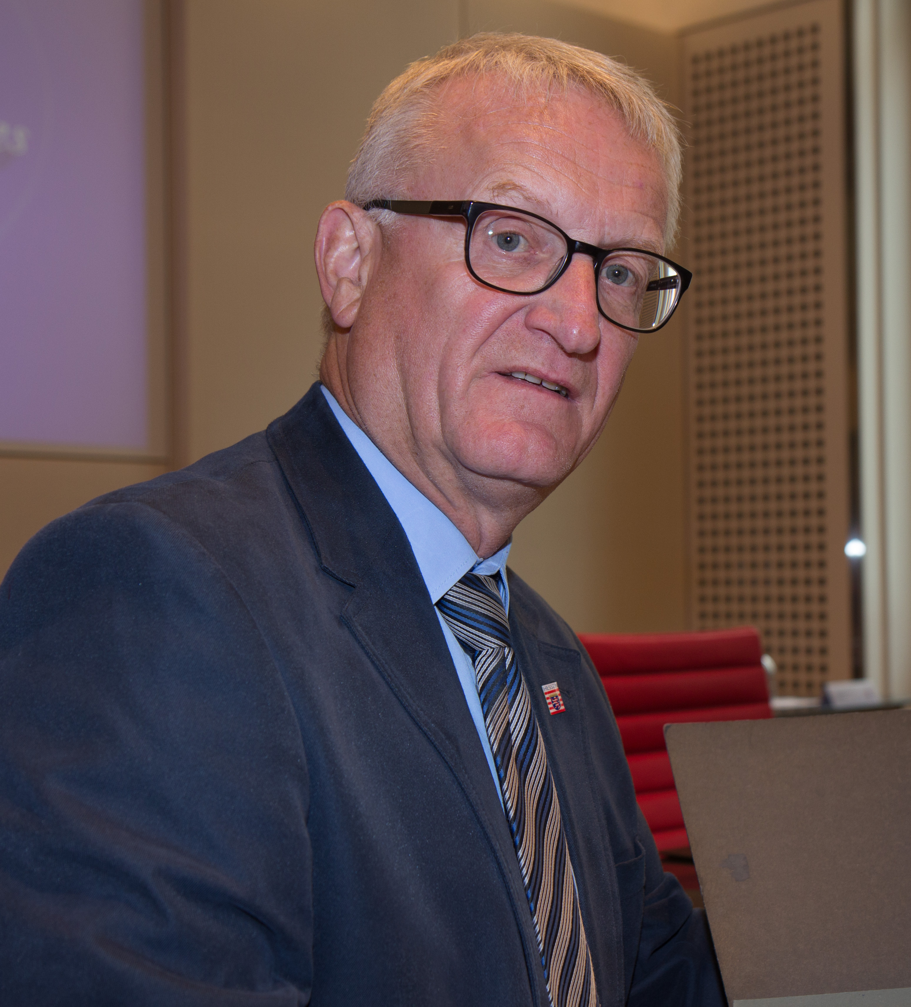 Sitzung der Hessischen Landesregierung mit dem Schwerpunkt Digitalisierung am 20. August 2018 in der Staatskanzlei. Teilnehmer: Wolfgang Dippel